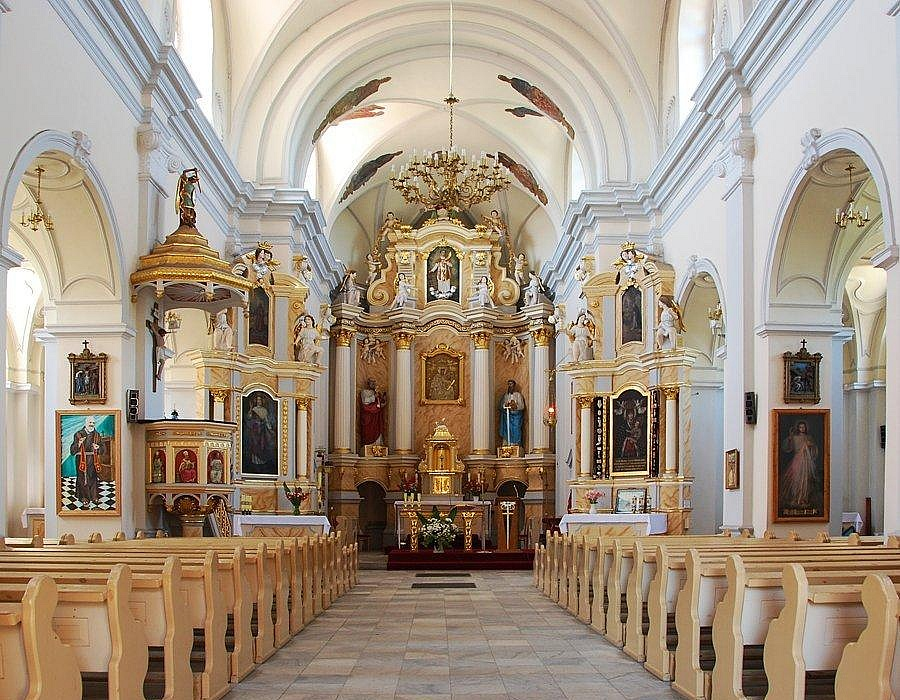 Wnętrze kościoła św. Wawrzyńca w Babimoście.